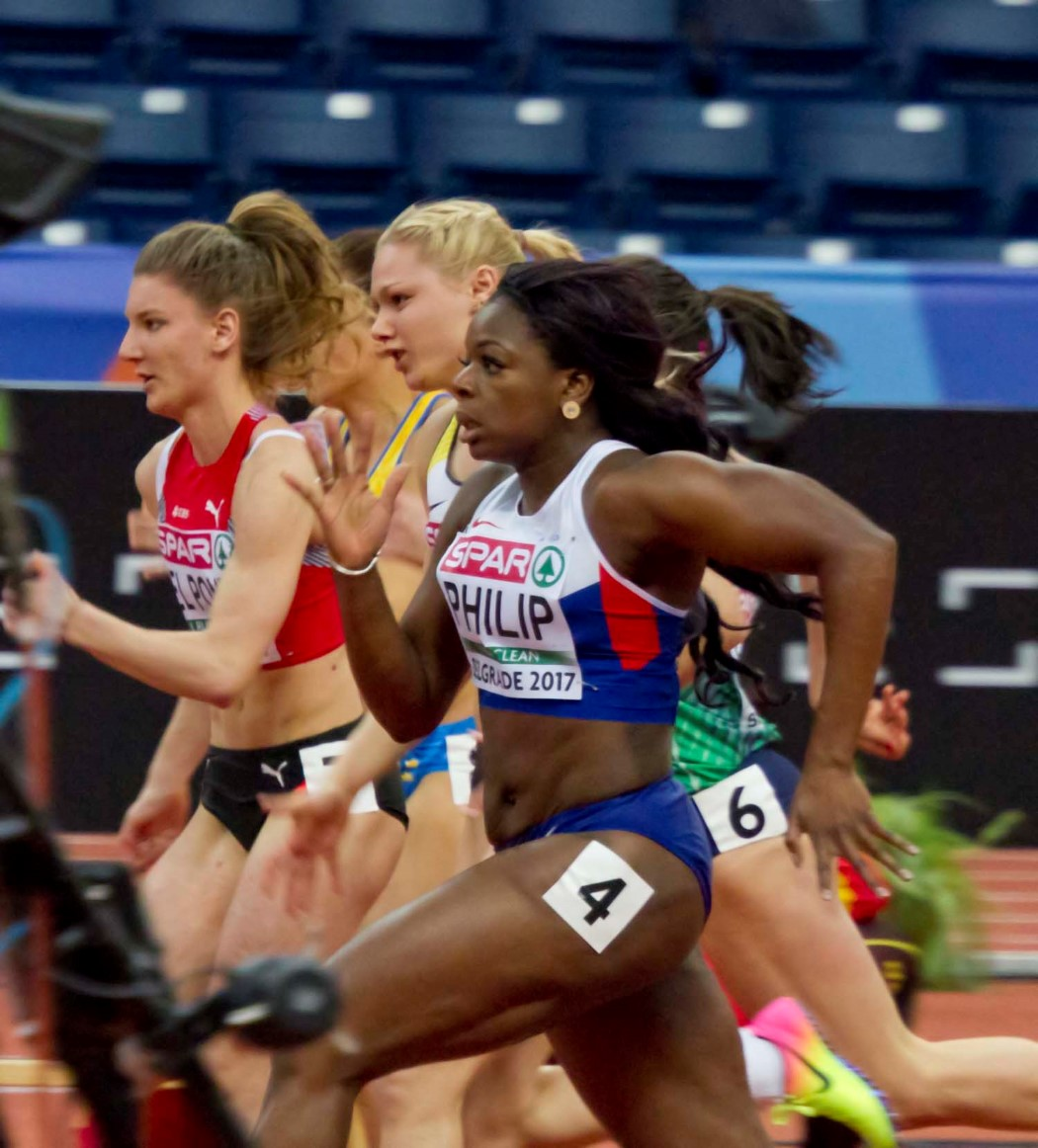 025 reeksen 60m philip